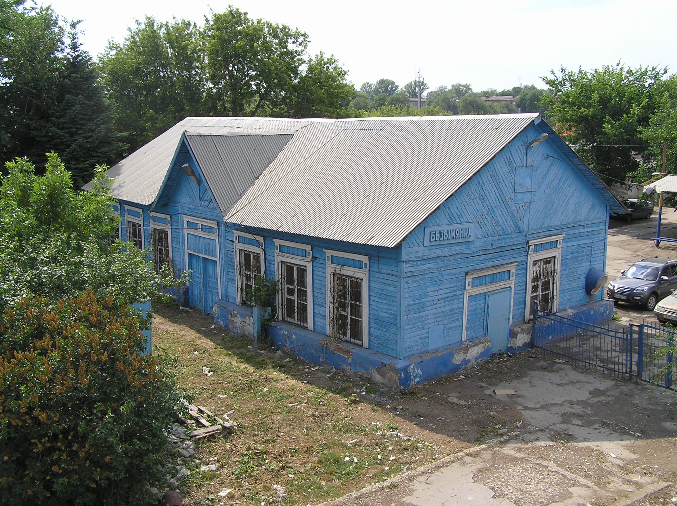 Вокзал ст. Безымянка, Куйбышевская ж.д.